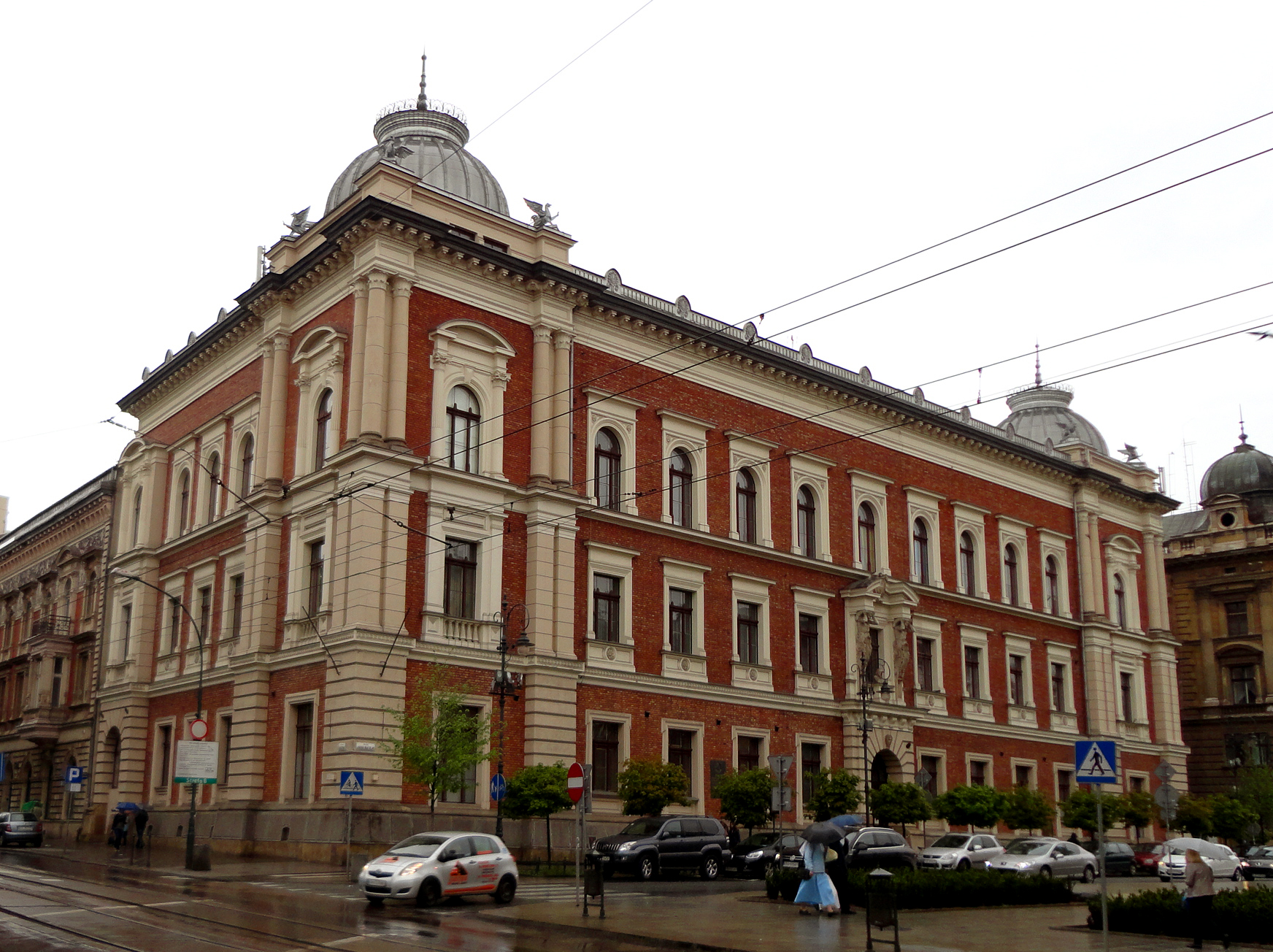 A Krakkói Képzőművészeti Akadémia főépülete